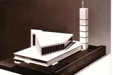 Modell als Baustein zum Neubau St. Matthäus Aschaffenburg - Gailbach